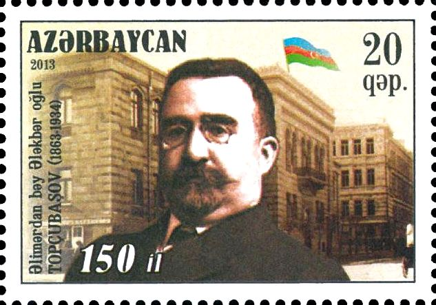 N 1086 - 20 qapik. The stamp dedicated to the 150th Ann. of the outstanding Azerbaijan statesman Alimardan Topchubashov.